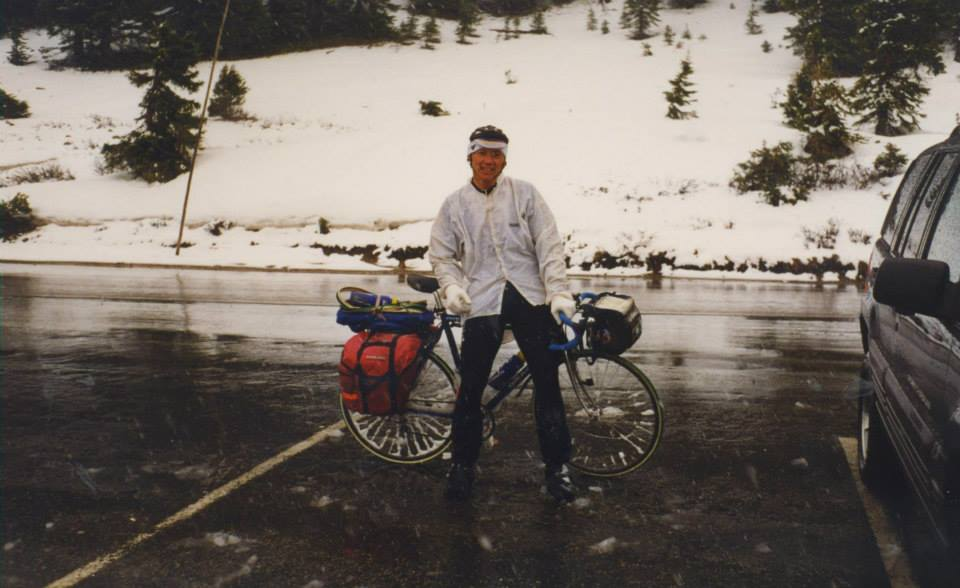 Turen "Denver til Portland"